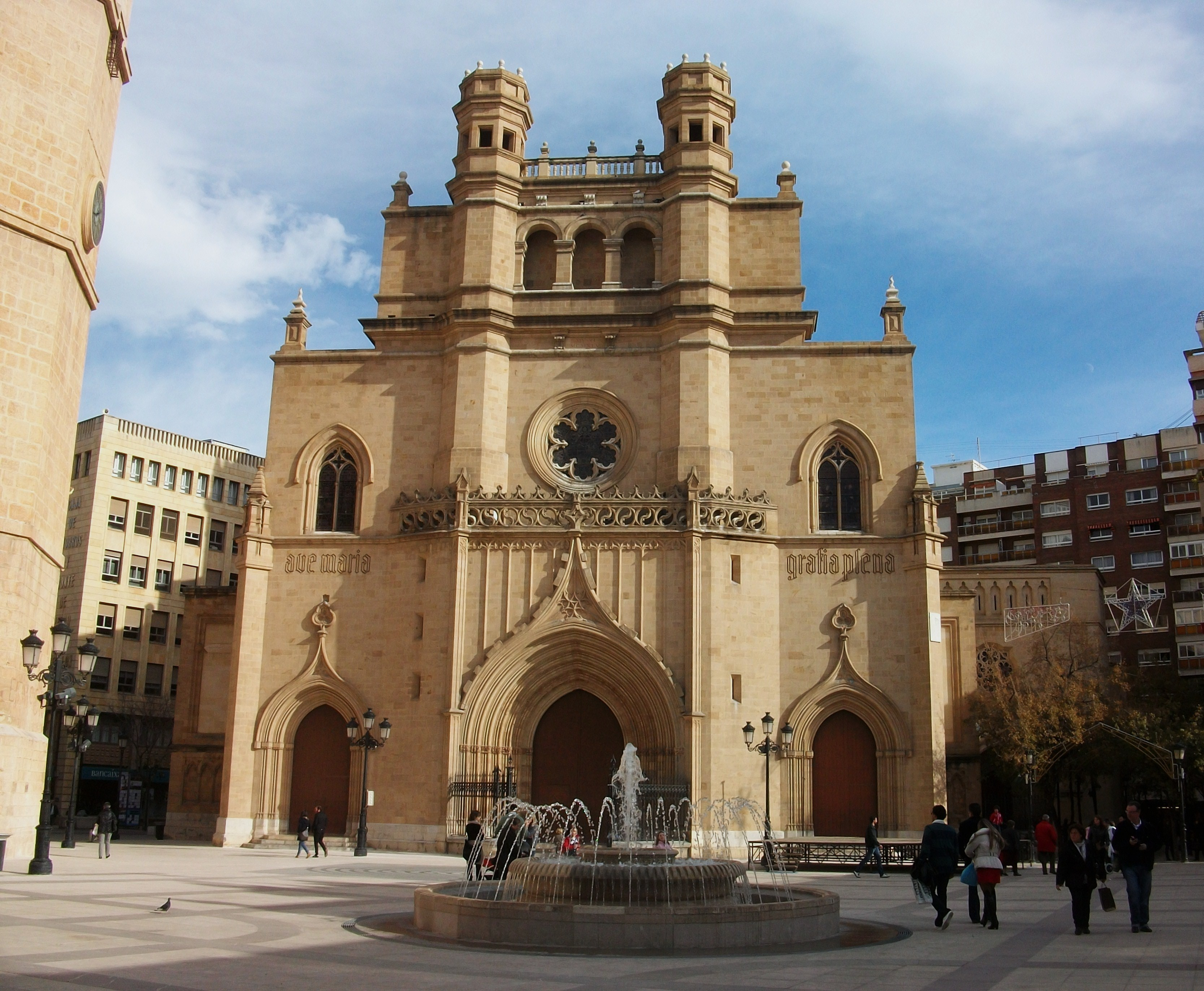 Façana de la cocatedral de santa Maria de Castelló.